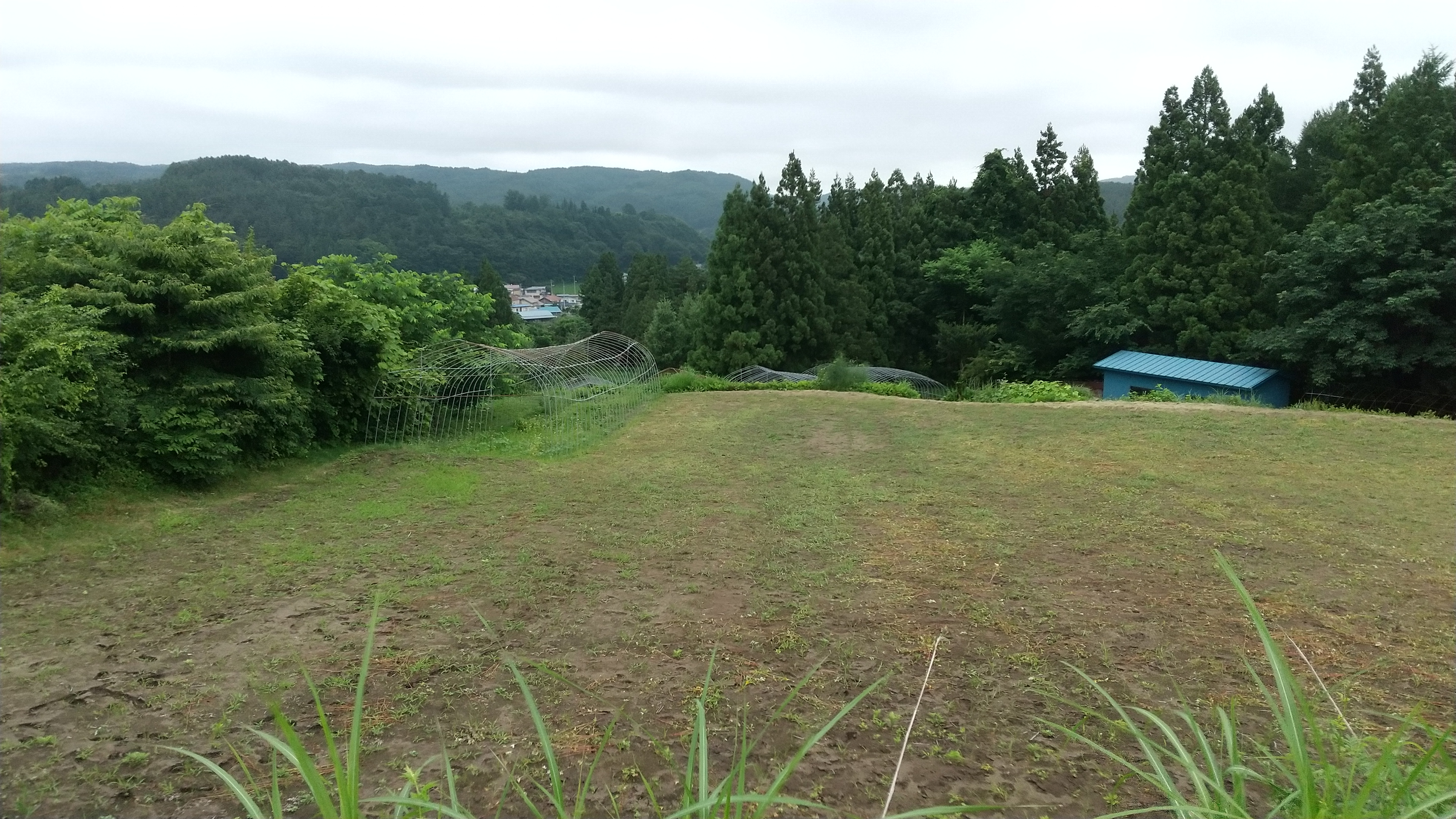 晴山館主郭からの眺め